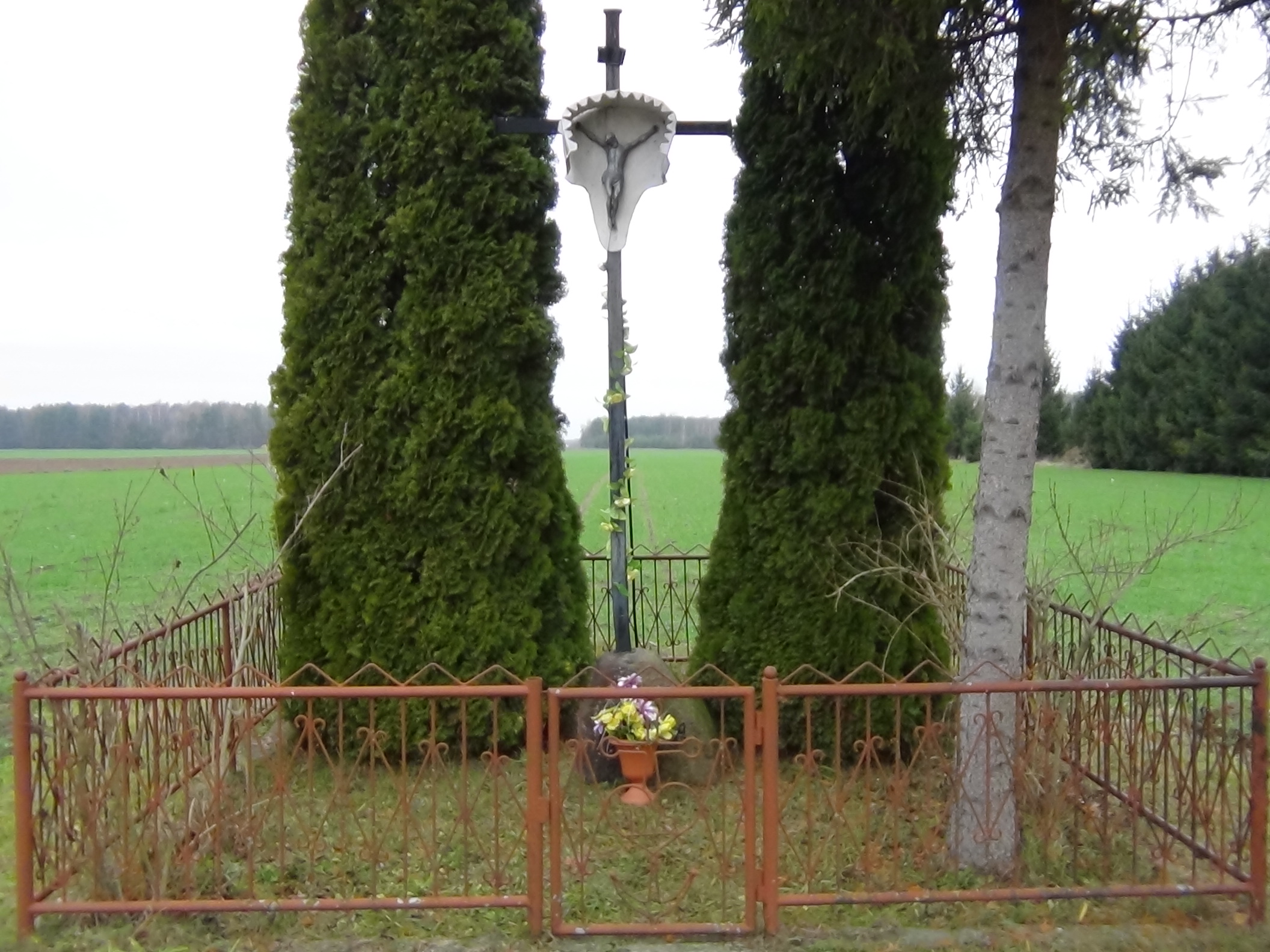 Rabędy - krzyż wbudowany w kamień